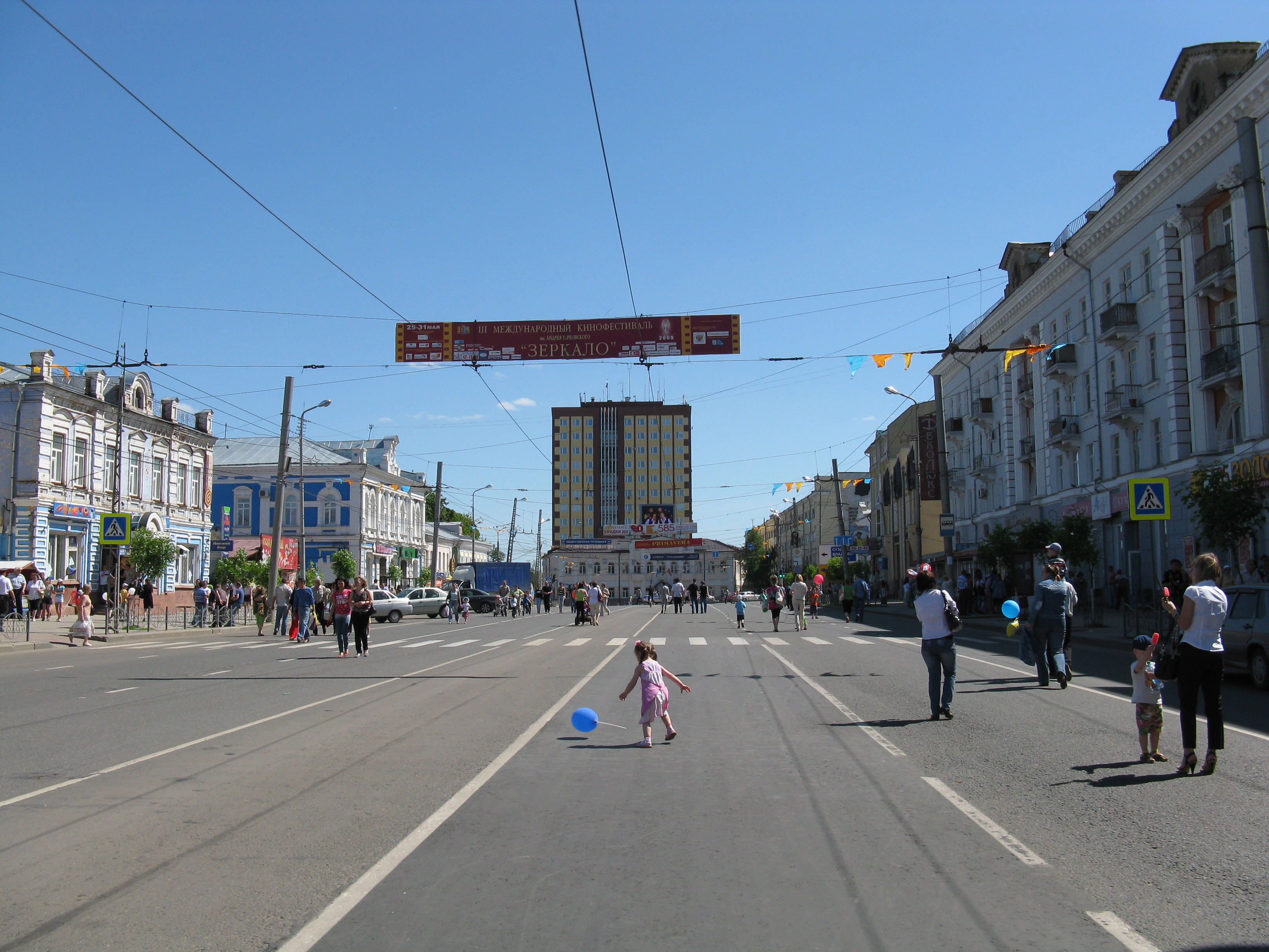 Начало проспекта Ленина во время празднования Дня города (Иваново, 2009 год). Вид на административные здания, расположенные на площади Революции.